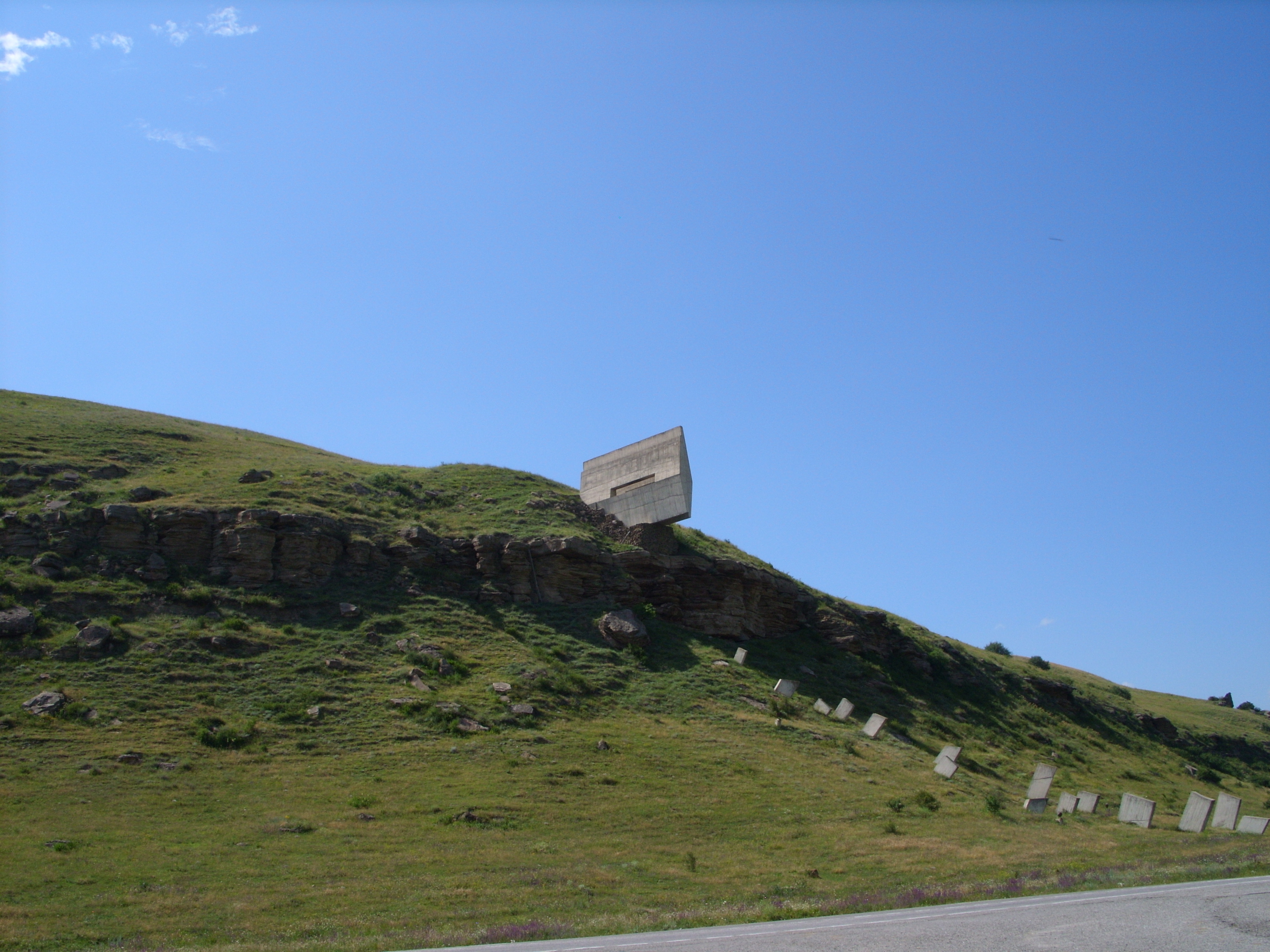 Экскурсия в Домбай из Железноводска, июль 2009 г. Фото с перевала Гумбаши и некоторых др. мест в Карачаевском районе Карачаево-Черкесии сделаны по дороге на Домбай и на обратном пути.